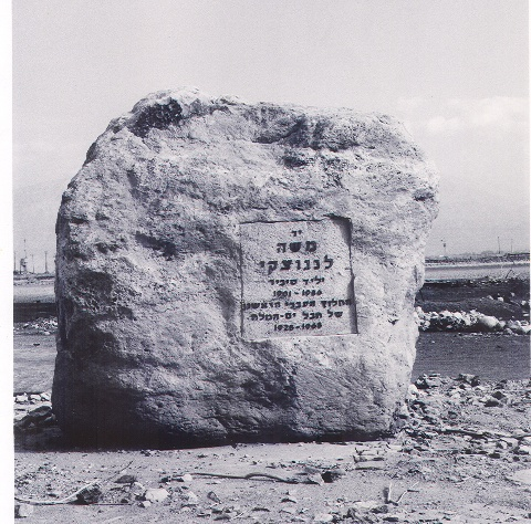 SDOM